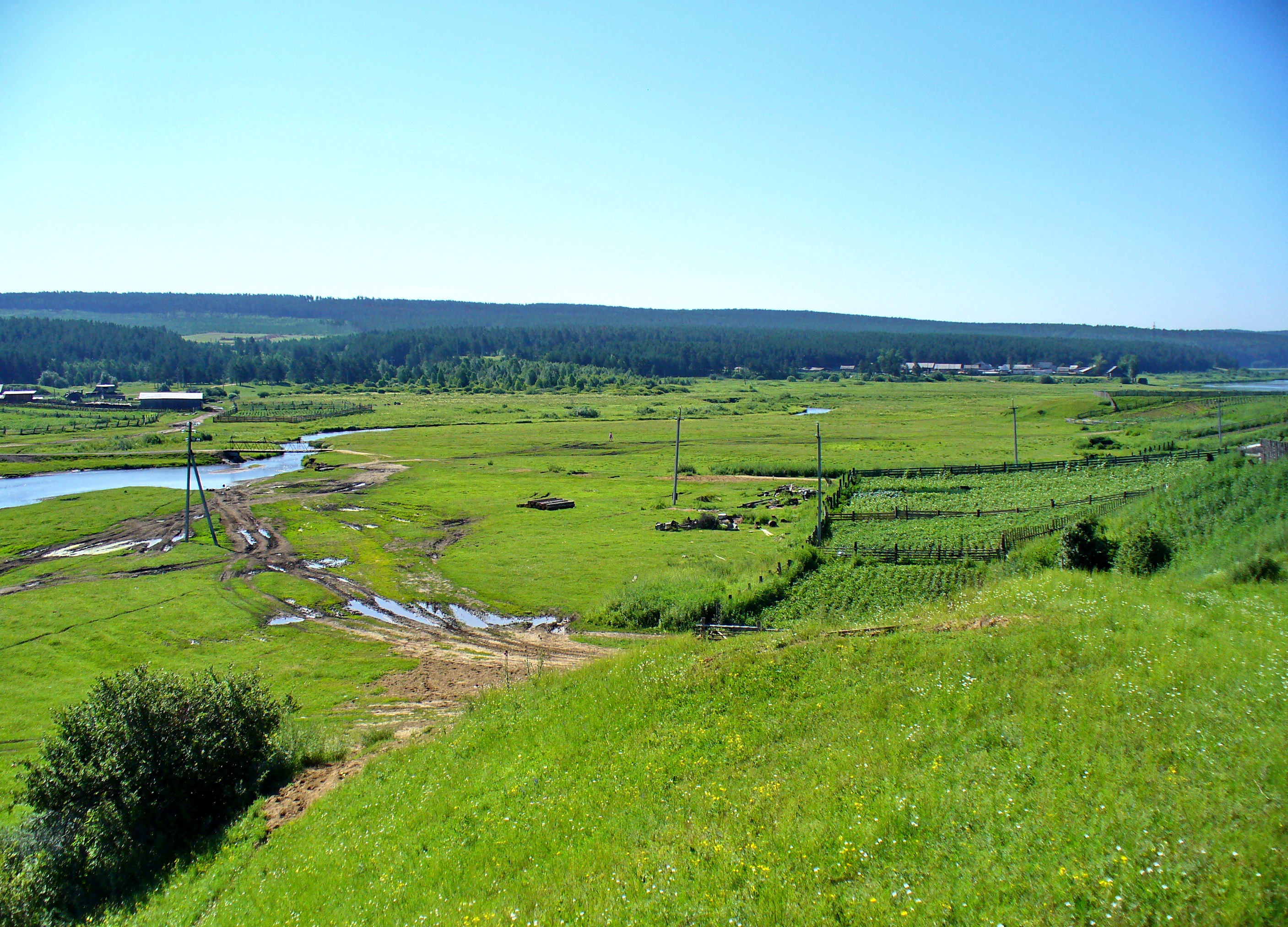 Посёлок Усть-Балей, Иркутская область, Российская Федерация.